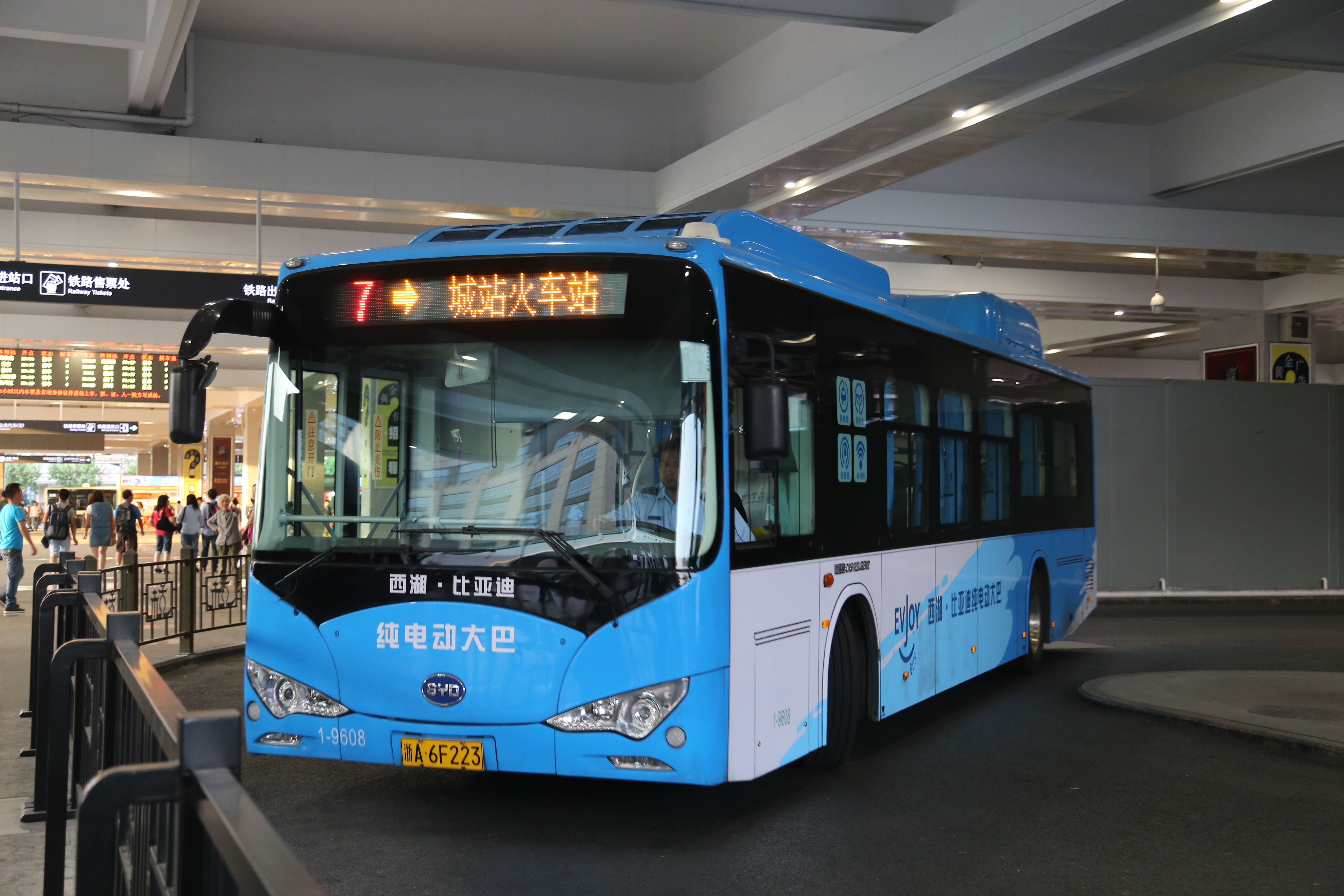 7路比亚迪电池车在城站火车站3